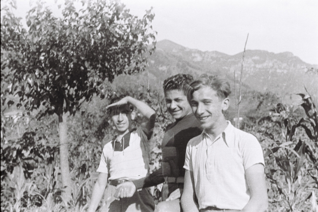 duke shetitur